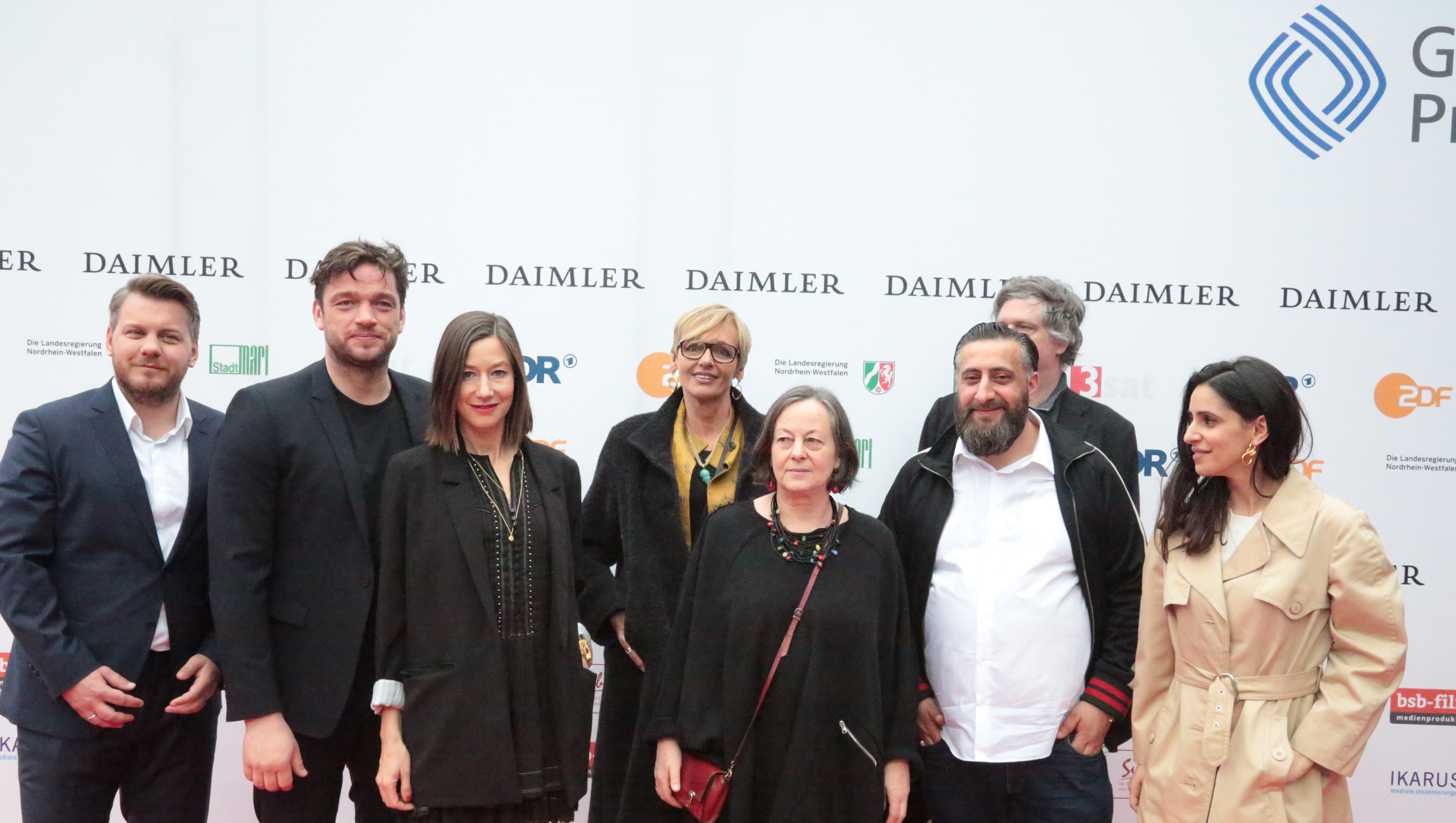 Marvin Kren, Ronald Zehrfeld, Johanna Wokalek, Petra Heim, Heide Schwochow, Kida Khodr Ramadan, Matthias Glasner, Maryam Zaree beim Grimme-Preis 2018, am 13.04.2018 in Marl.